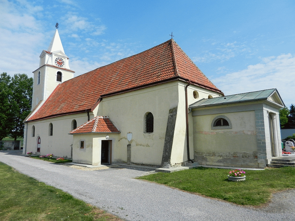 Die Pfarrkirche in Wienerherberg, ehemalige Mutterkirche von Ebergassing und Rauchenwarth.